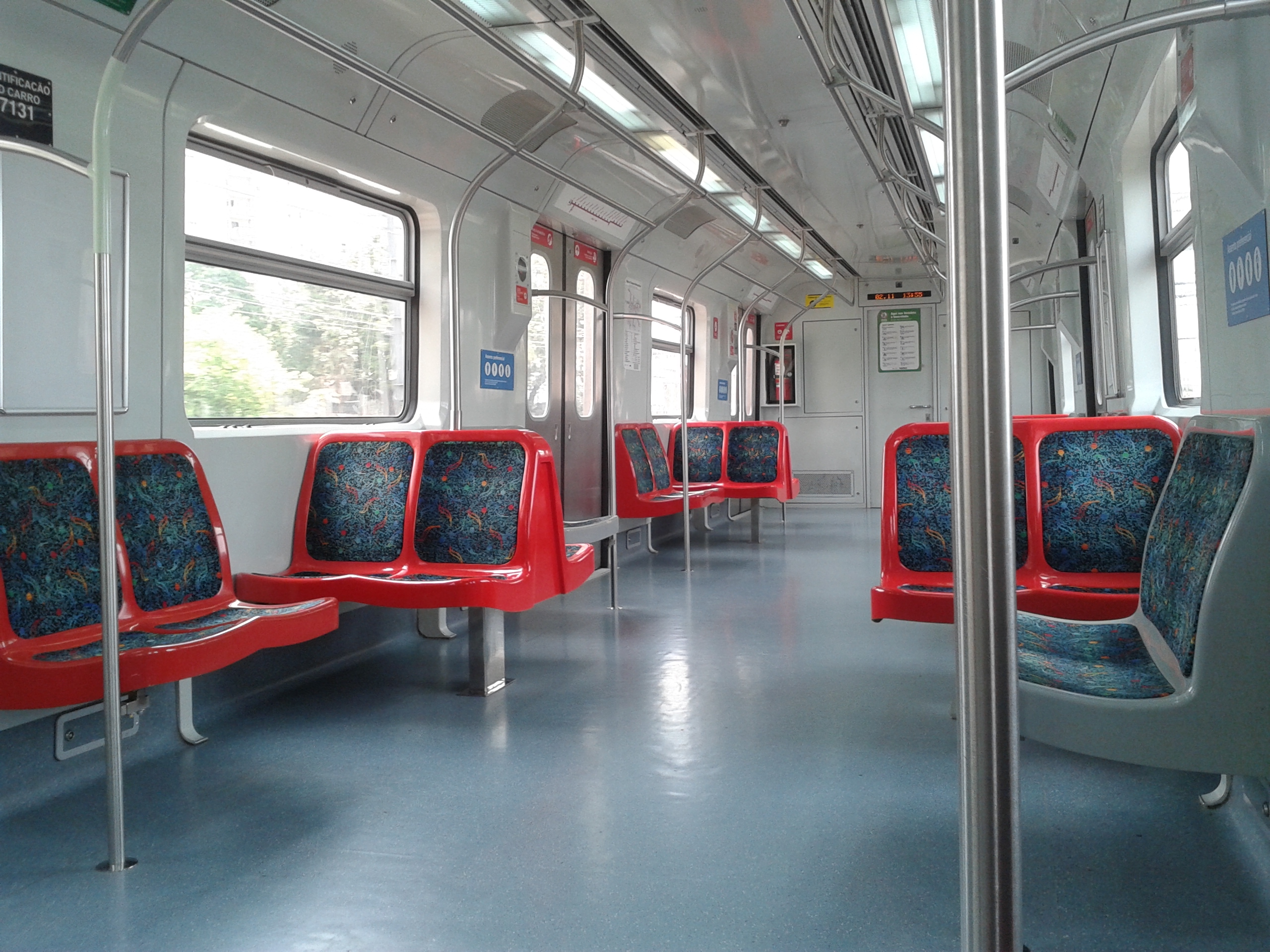 Interior de trem da CPTM, na cidade de São Paulo. Partindo da estação da Barra Funda.